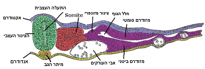 חתך רוחב של עובר אפרוח לאחר הדגרה של 45 שעות. Colorized version of Image:Gray19.png, from Gray's Anatomy